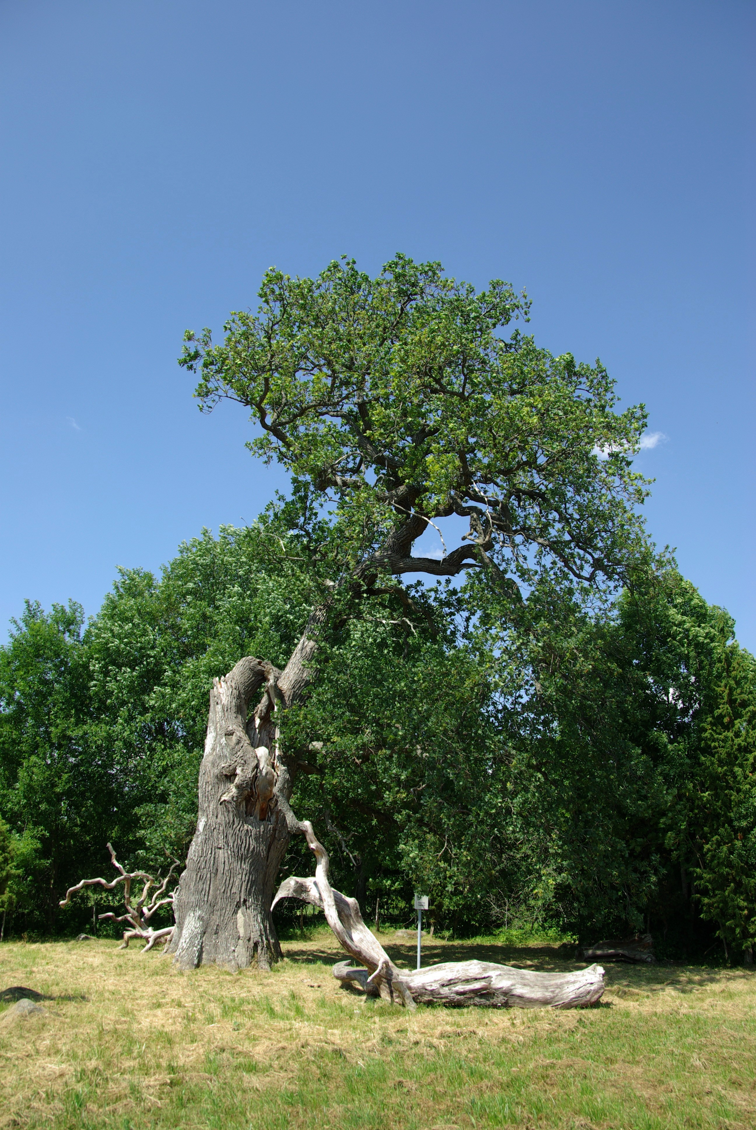 Kastna tammed